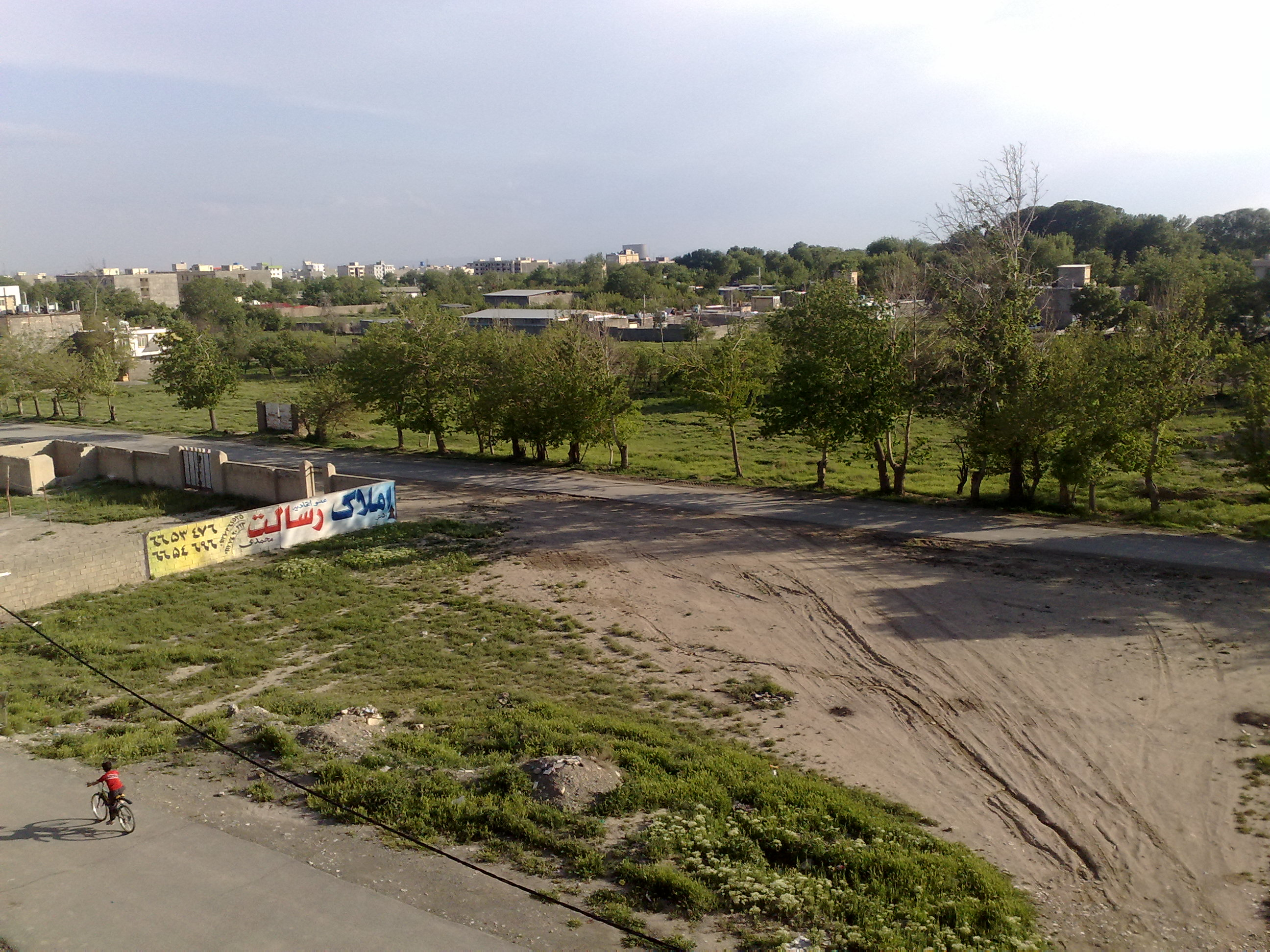 سرحداباد زیبا